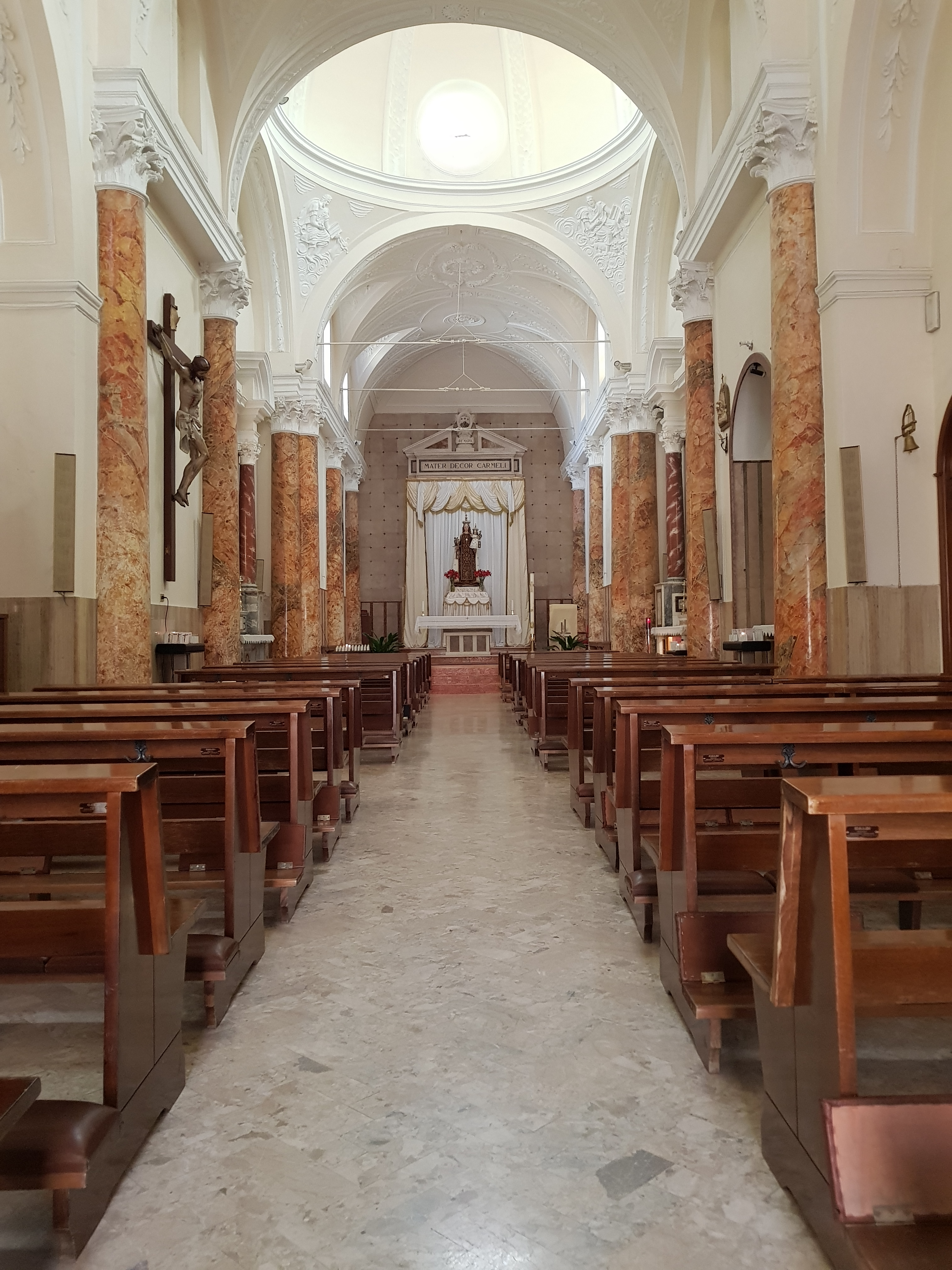 Interno Chiesa del Carmine Mottola